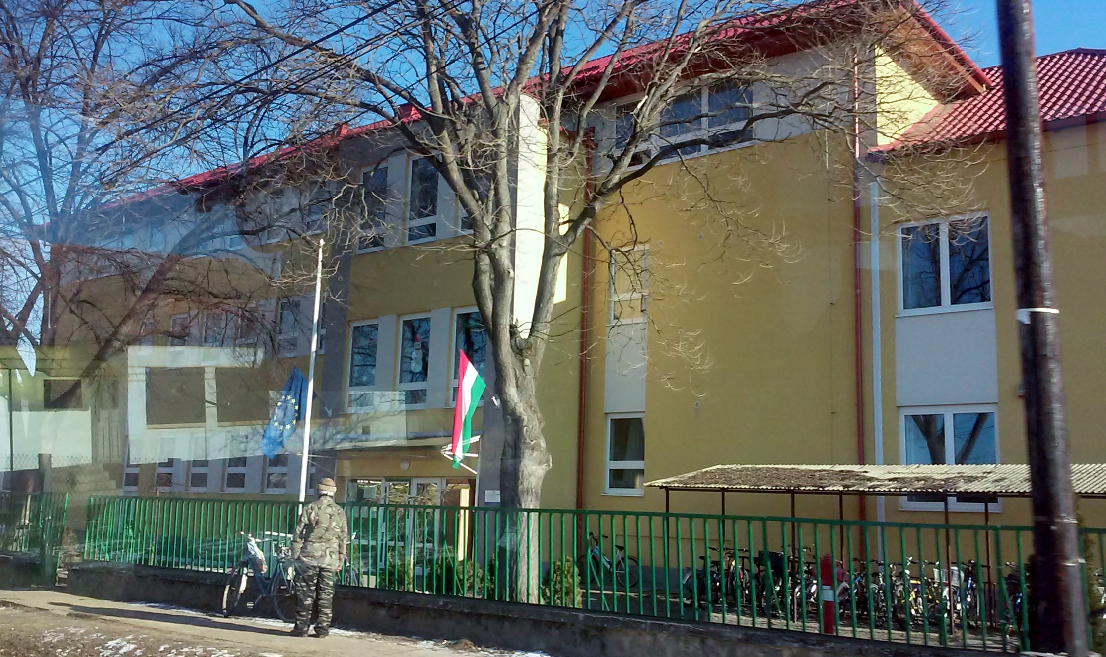 Utassy József Általános Iskola főépület, Tarnalelesz